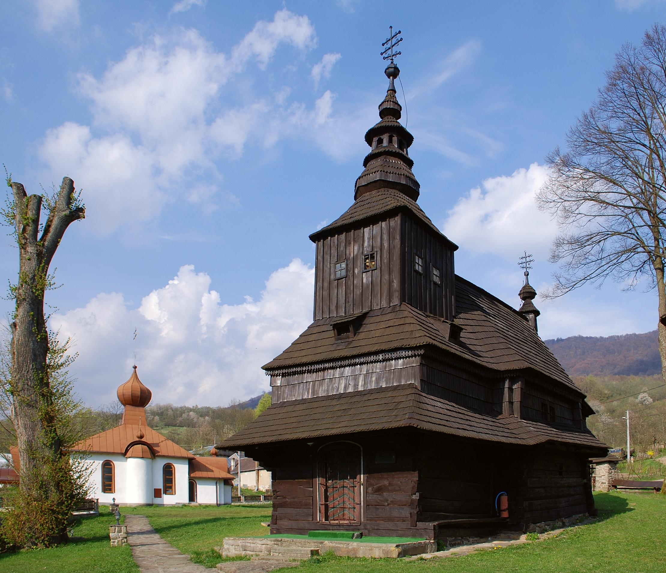 cerkwie